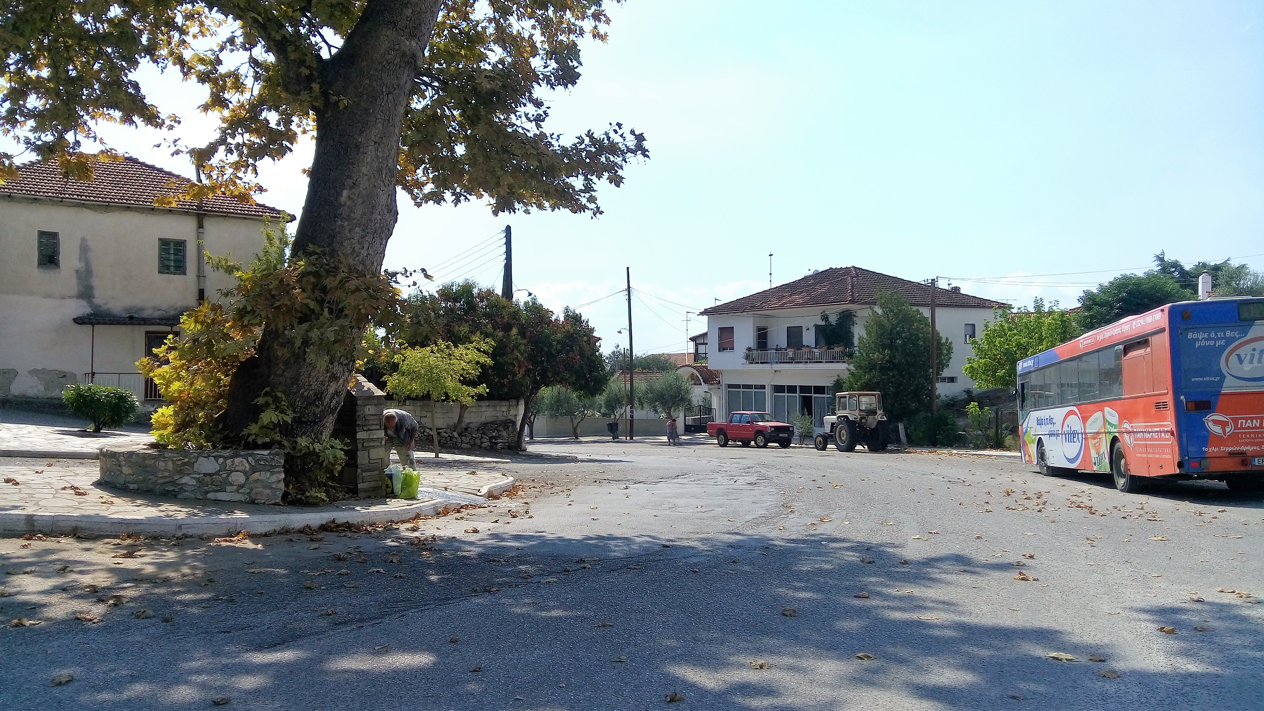 Το βόρειο άκρο της κεντρικής πλατείας του Νέου Σουλίου.